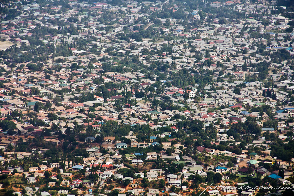 Kimara, Dar es Salaam, Tanzania